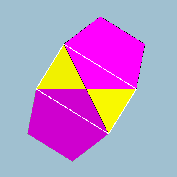 Vertex Figure for Icosidodecahedron